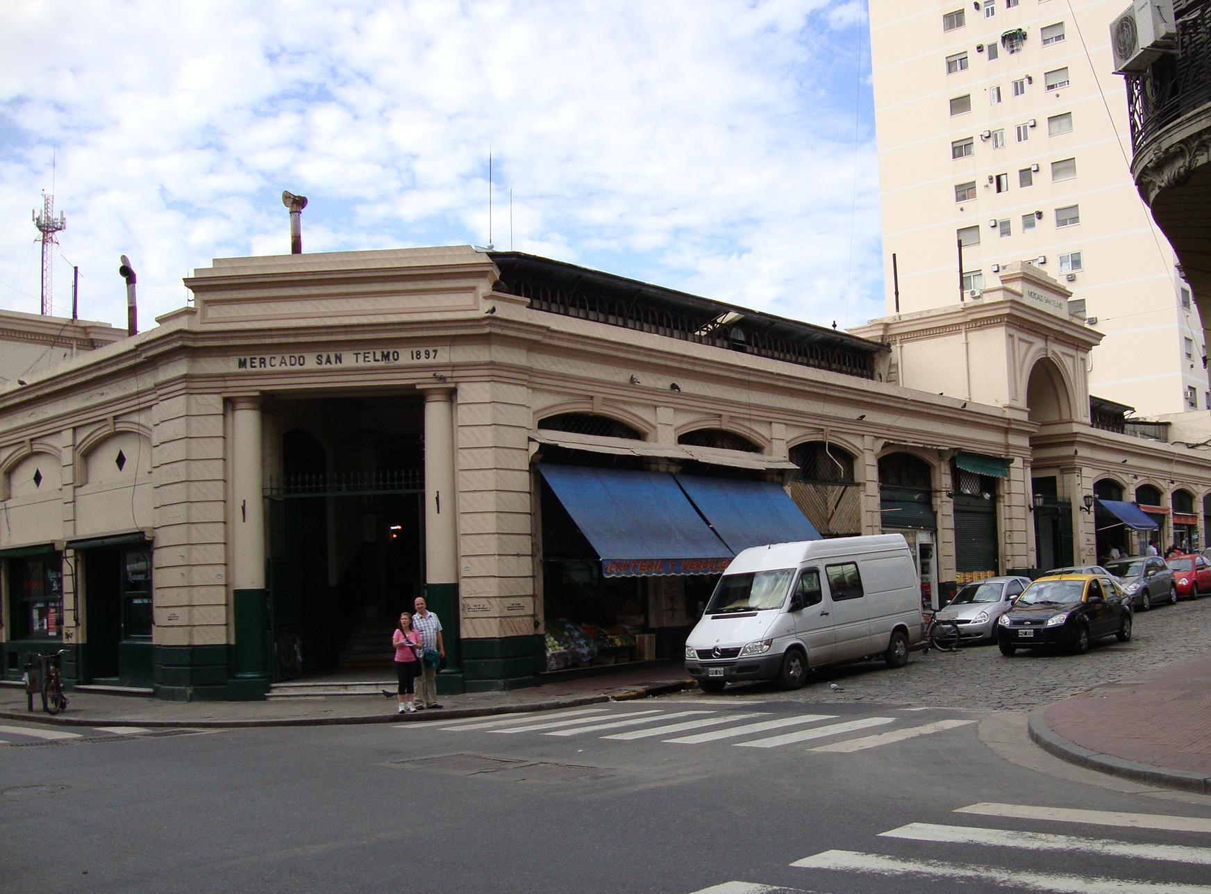 Vista de los accesos al Mercado San Telmo en la esquina de las calles Bolívar y Carlos Calvo.